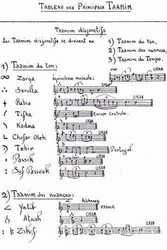 accents musicaux pour chanter la Bible